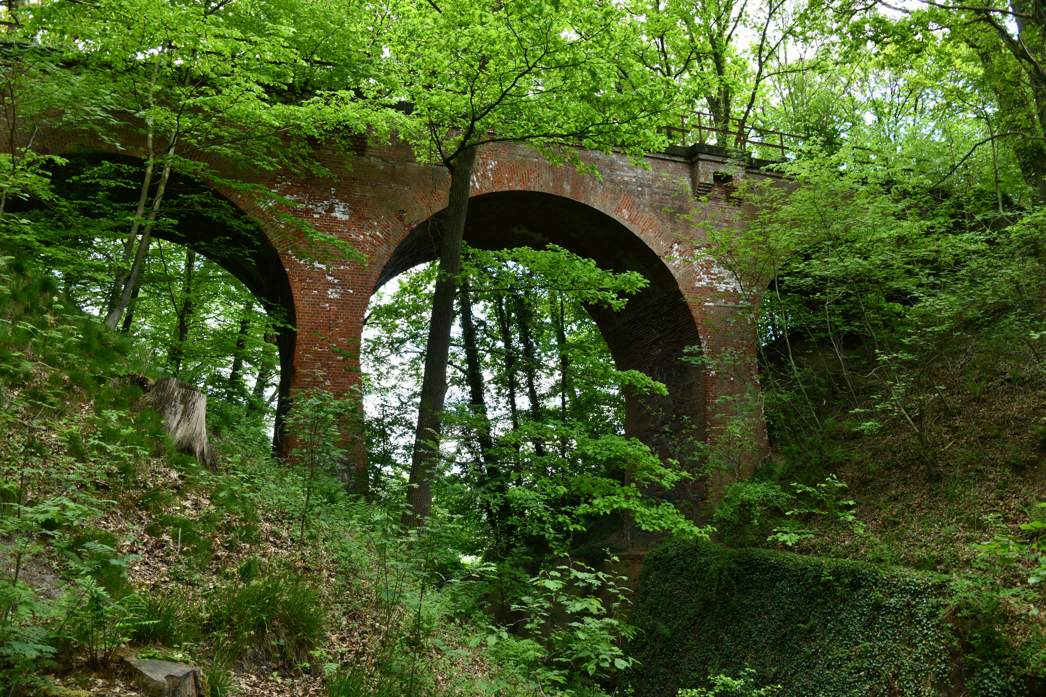 Staersbach Viadukt von Süden